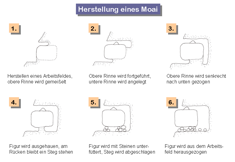 Schema der Herstellung der Moais auf der Osterinsel